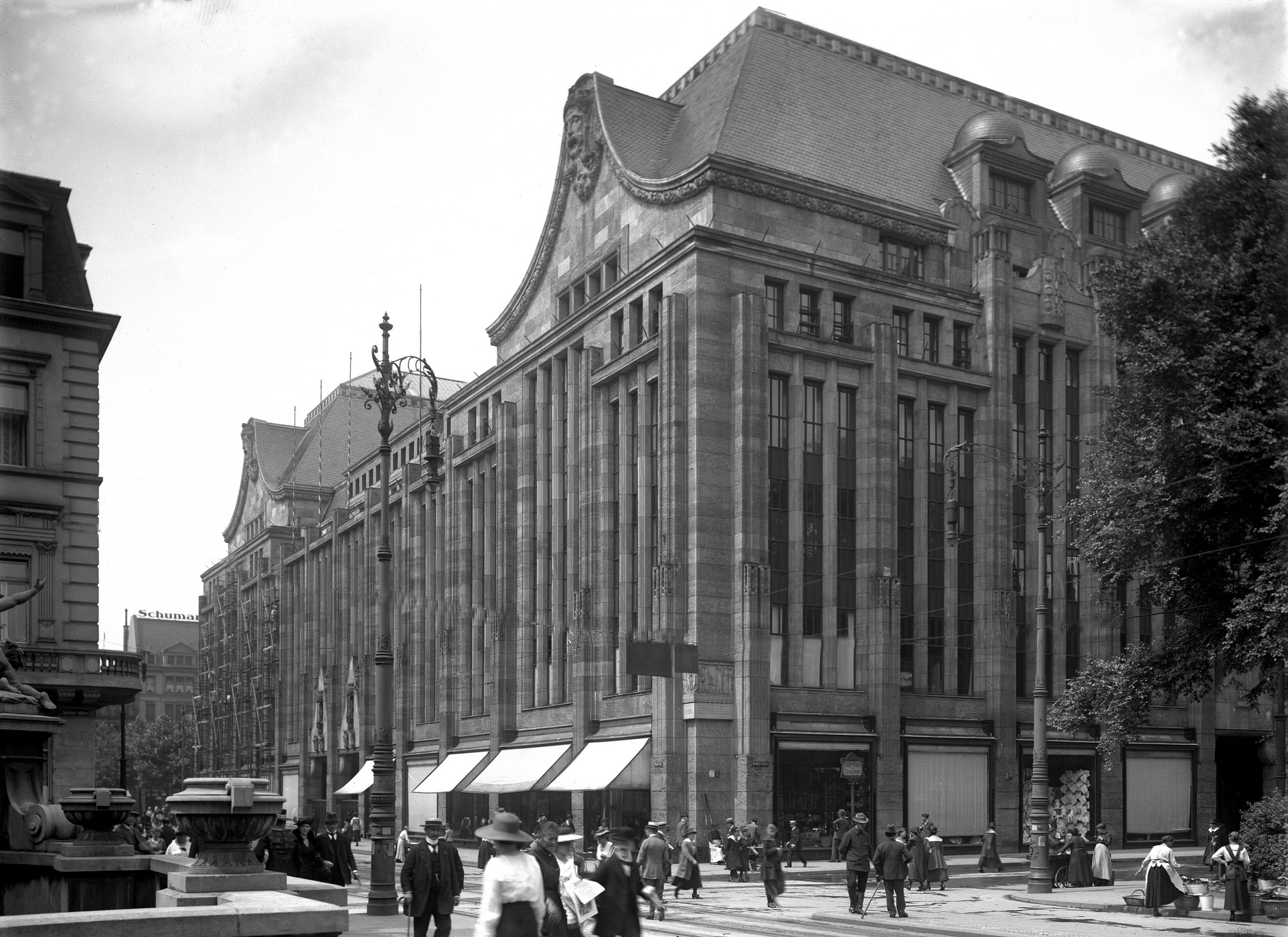 Warenhaus der Leonhard Tietz AG in Düsseldorf; erbaut 1907-1909 nach Entwurf des Architekten Josef Maria Olbrich († 1908)